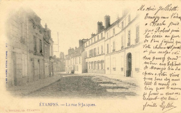 Scan d'une carte postale de 1903 par Jean-Michel Rousseau